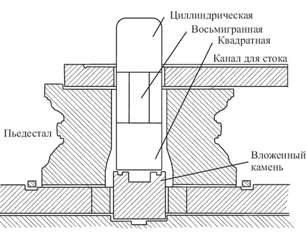 Классическая ритуальная линга в разрезе